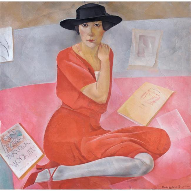 Princess Salomea Andronnikova (?)